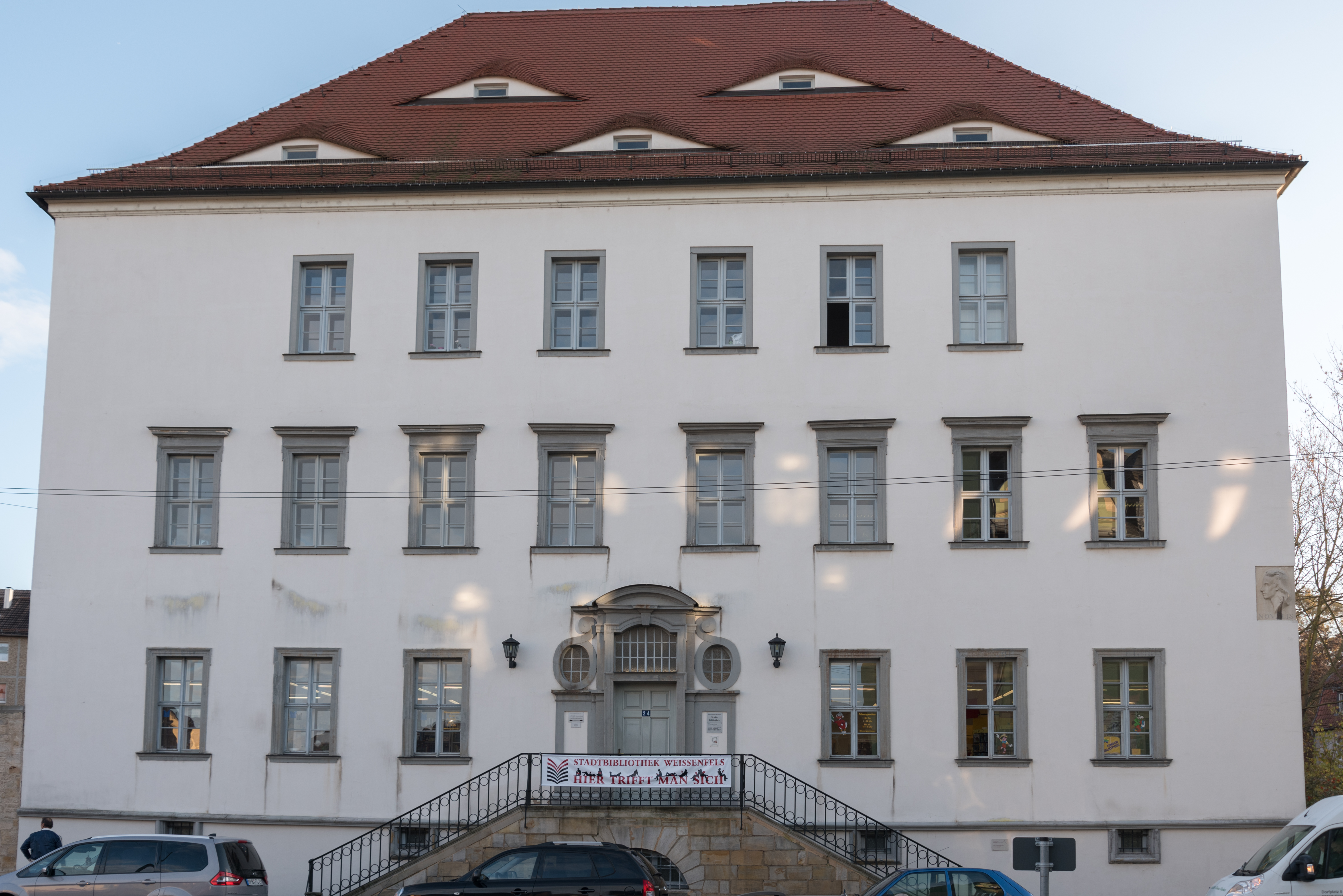 Weißenfels, Klosterstraße 24, Novalishaus, heute auch Stadtbibliothek